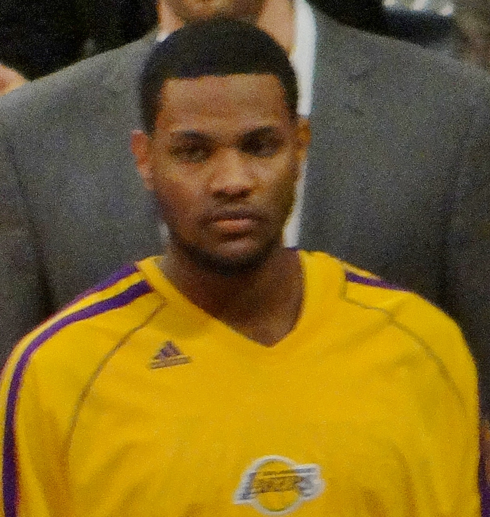 Bucks @ Lakers Staples Center 1/15/2013